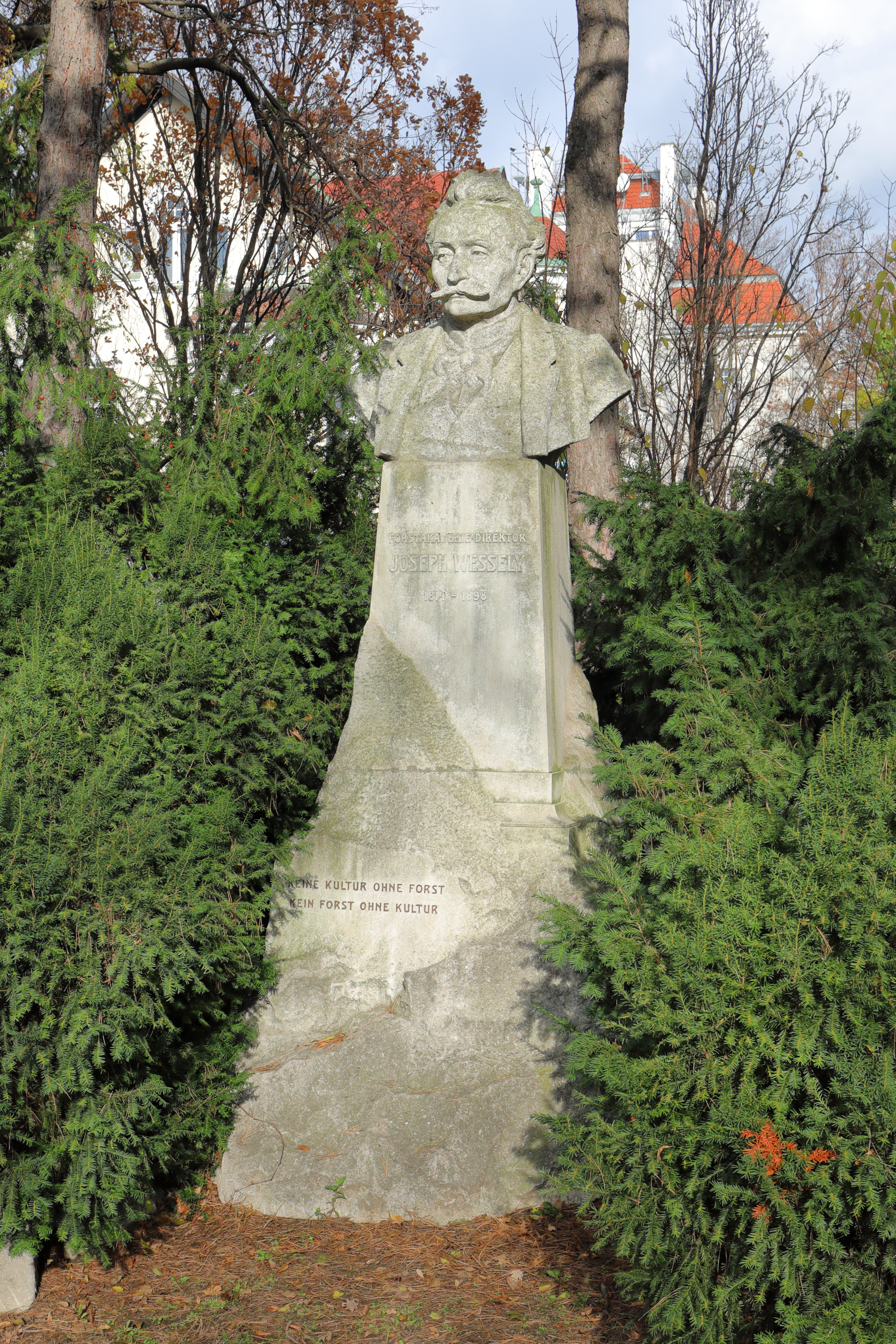 Das Joseph-Wessely-Denkmal nordseitig am Linnéplatz nächst der Universität für Bodenkultur im 19. Wiener Bezirk Döbling.Das Denkmal in Gedenken an den Direktor der Forstakademie Mariabrunn Joseph Wessely ist ein Werk von Rudolf Weyr und wurde am 16. Mai 1908 enthüllt. Es besteht aus einem unregelmäßigen Felssockel, der in einen vierseitigen, sich nach oben verjüngenden Sockel übergeht und der eine Büste trägt. Diese Büste war ursprünglich ein Bronzeguss und wurde während des Krieges als Metallreserve des Dritten Reiches entfernt. Aus dem erhalten gebliebenen Gipsabguss fertigten die Vereinigten Wiener Metallwerken um 1953 eine Steinguss-Büste und mit dieser wurde dann das Denkmal wieder vervollständigt.